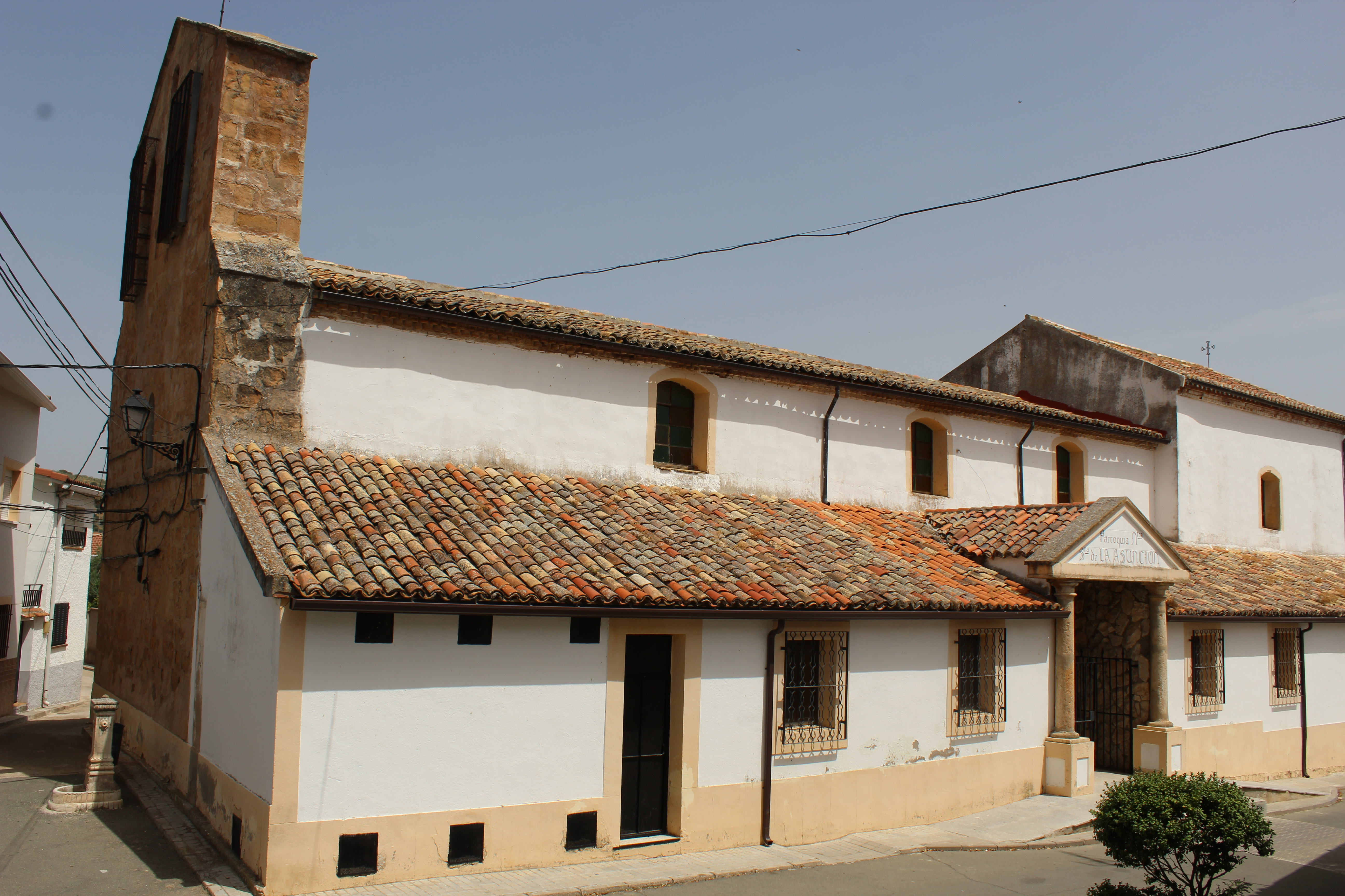 Iglesia de Espinosa de Henares, Espinosa de Henares, provincia de Guadalajara.